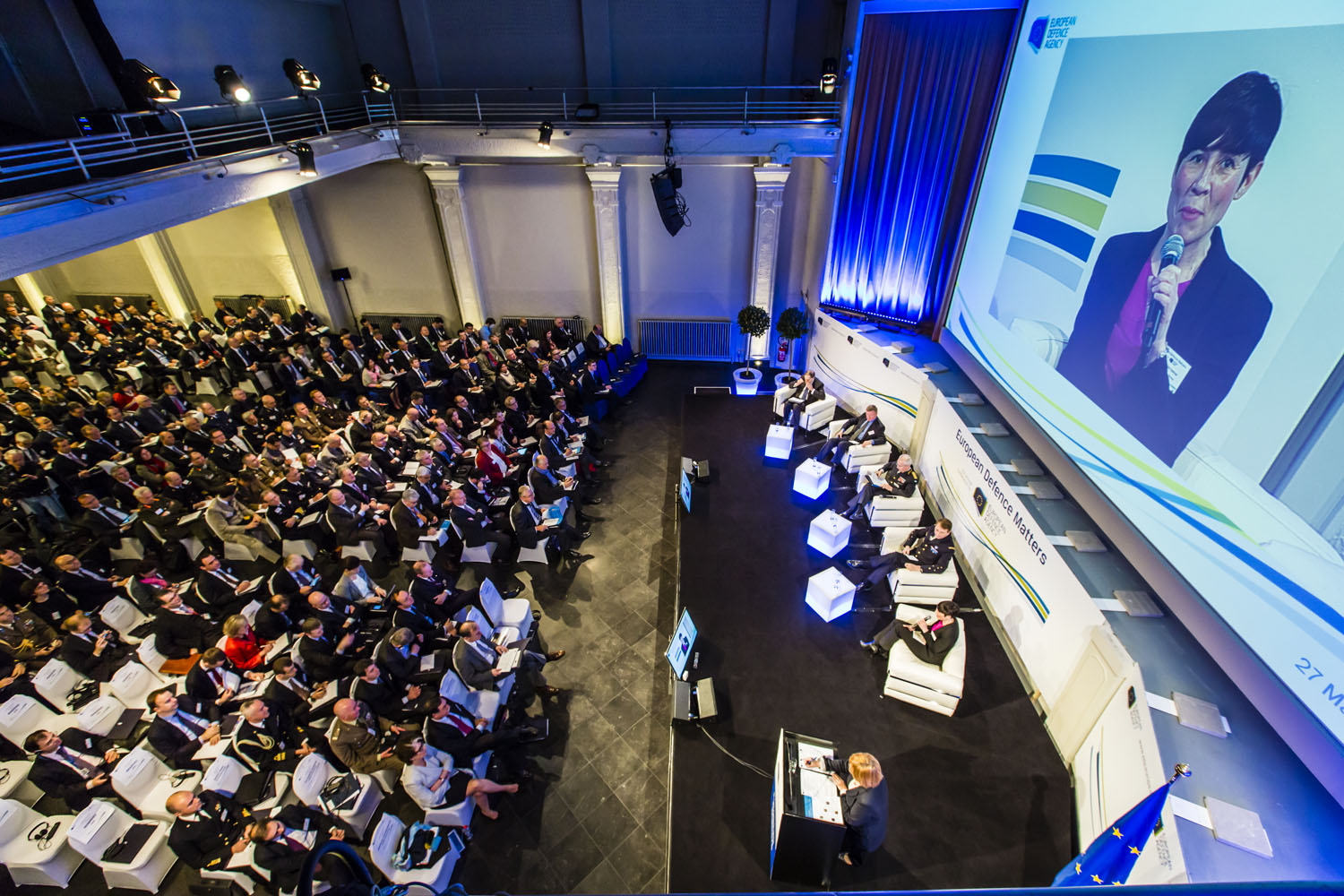 EDA_conference_140327_0099